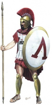 hoplita